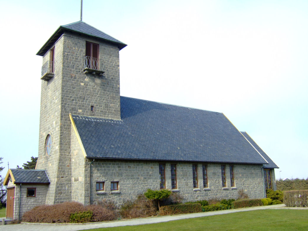 Orre kirke, Klepp, Rogaland Norway